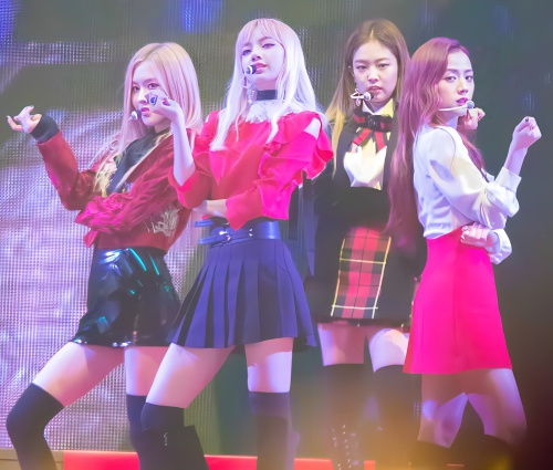 20161119 블랙핑크 멜론뮤직어워드